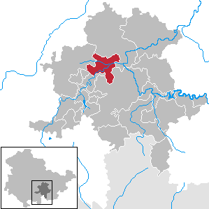 Bad Blankenburg in Thuringia - District Saalfeld-Rudolstadt